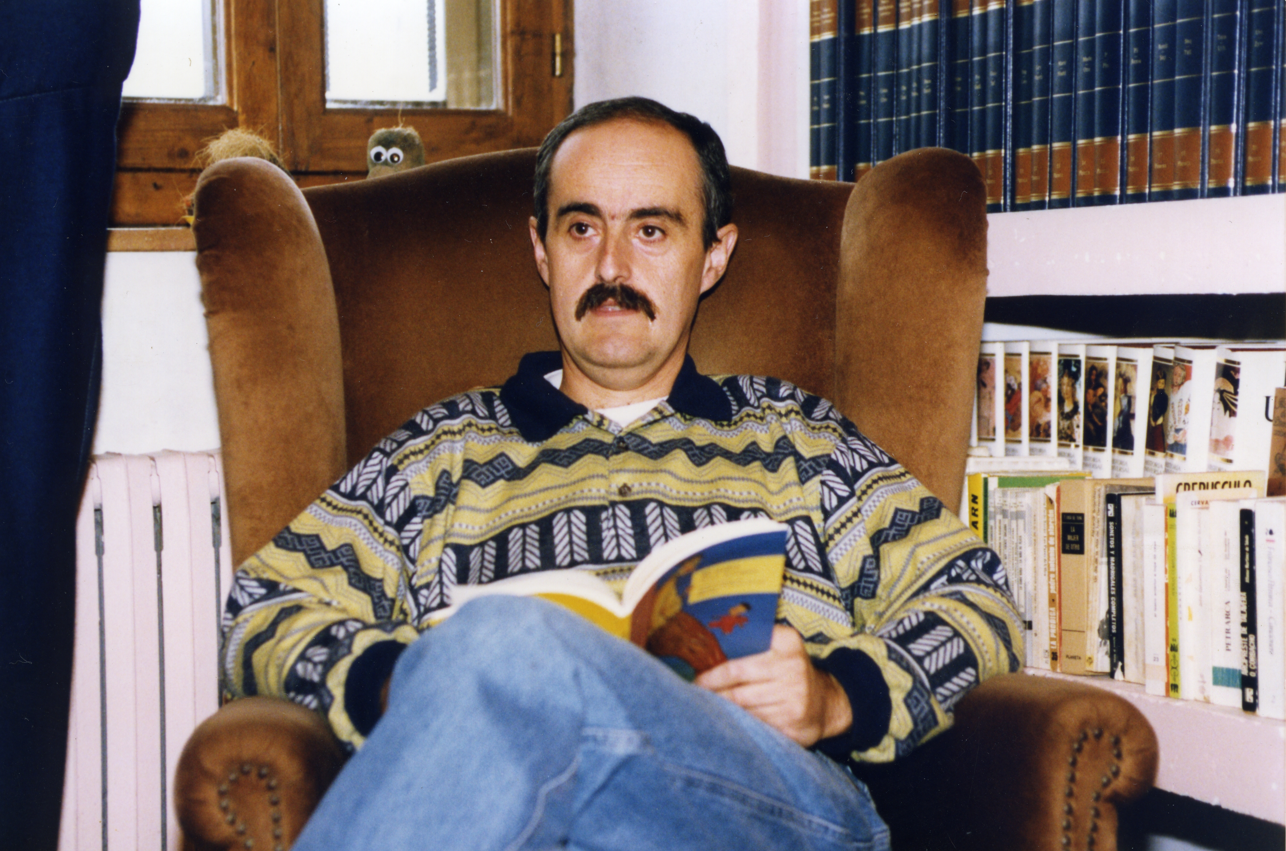 Idazleari elkarrizketa. Aiurri 28 zbk. 17. orr.